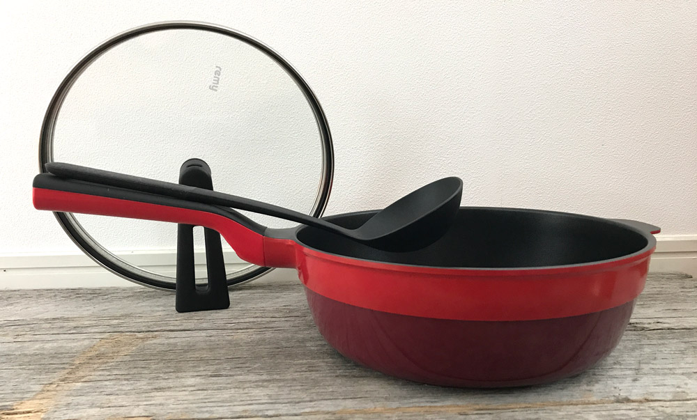 レミパンプラス（レッド）